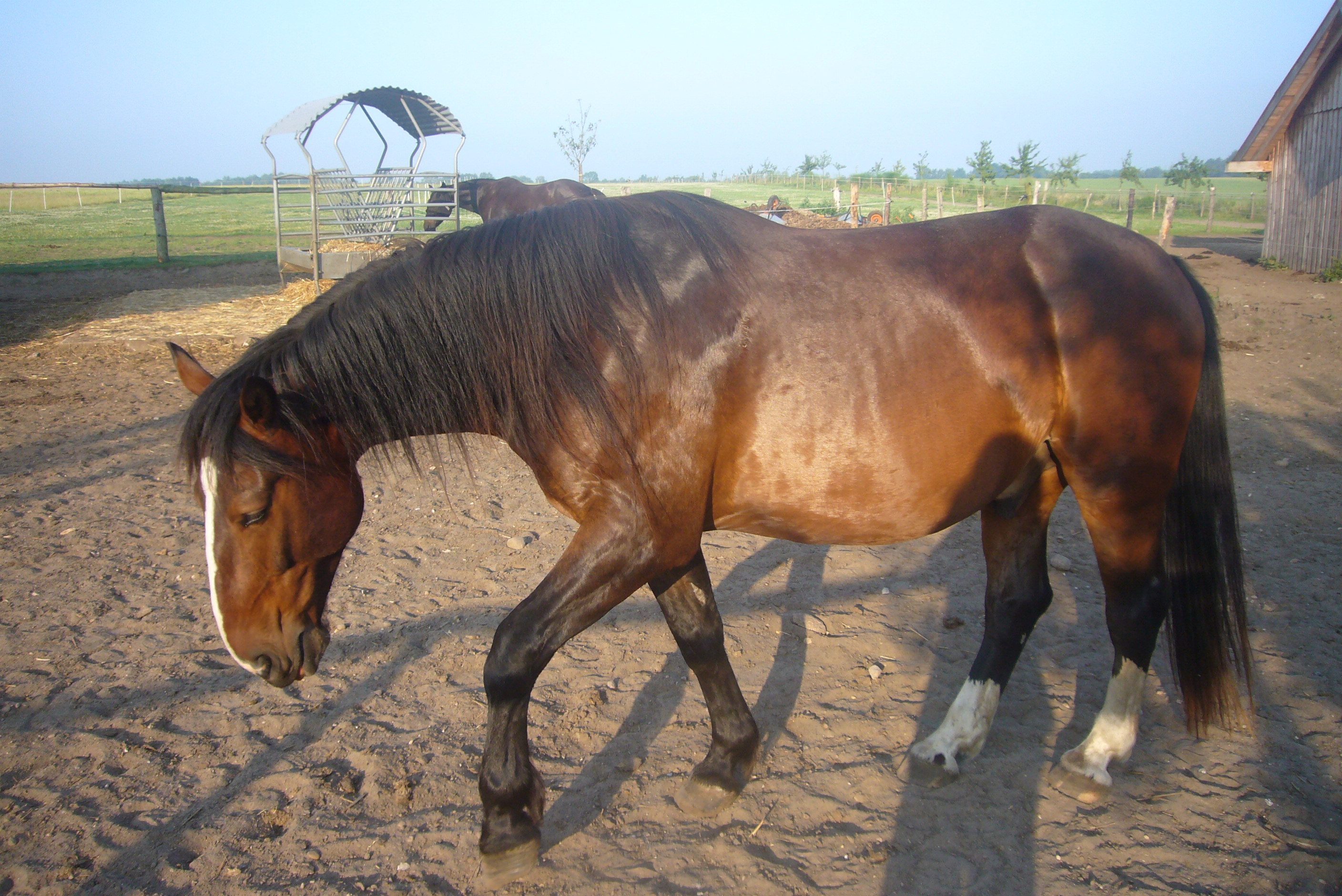 Alt-Oldenburger